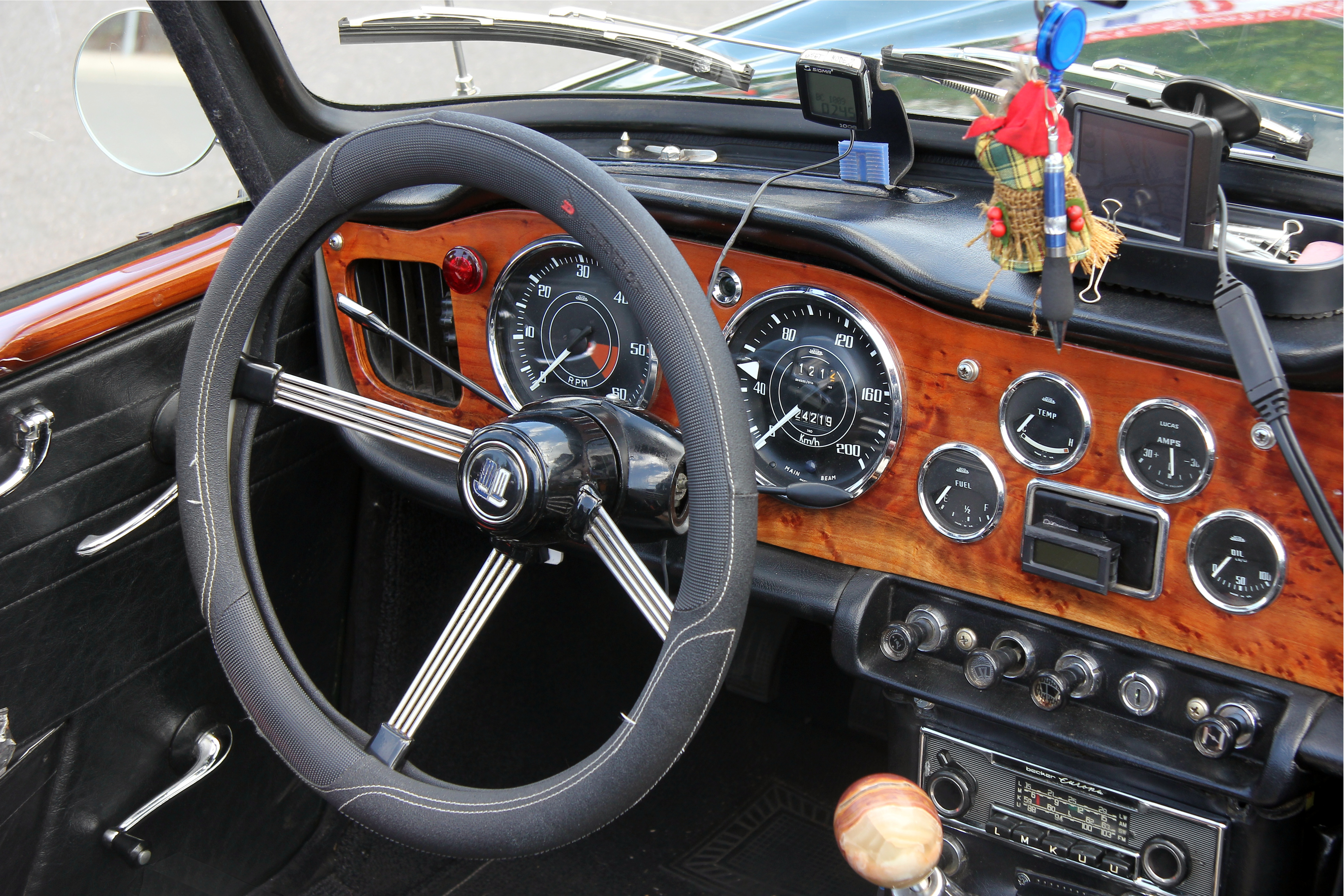 Triumph TR 4A, gebaut von 1965 bis 1967; Lenkrad mit Dunlop-Lenkradhülle und Armaturenbrett.